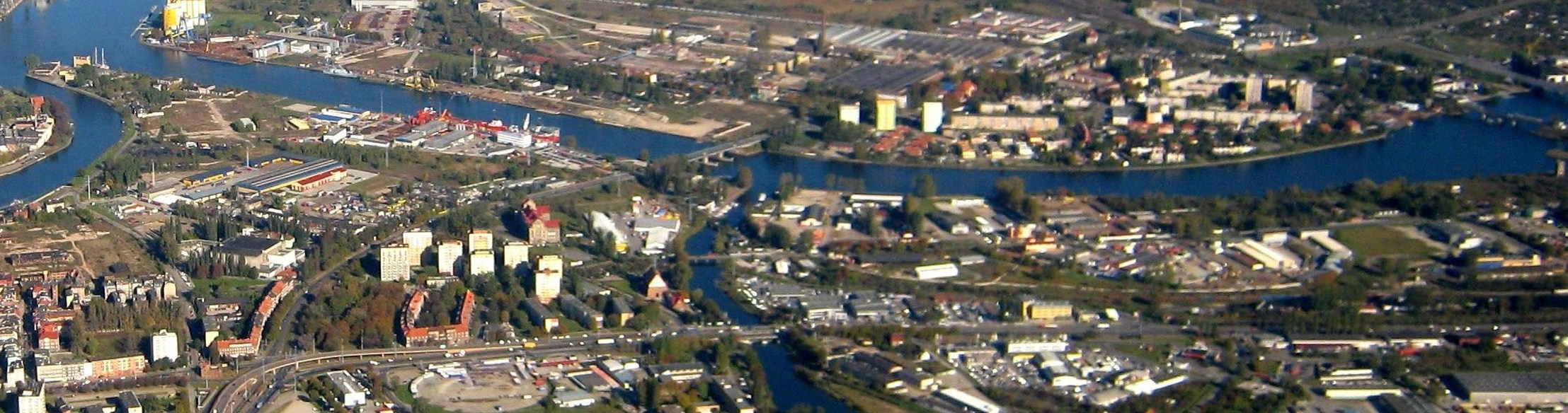 Gdańsk, osiedle Sienna Grobla.